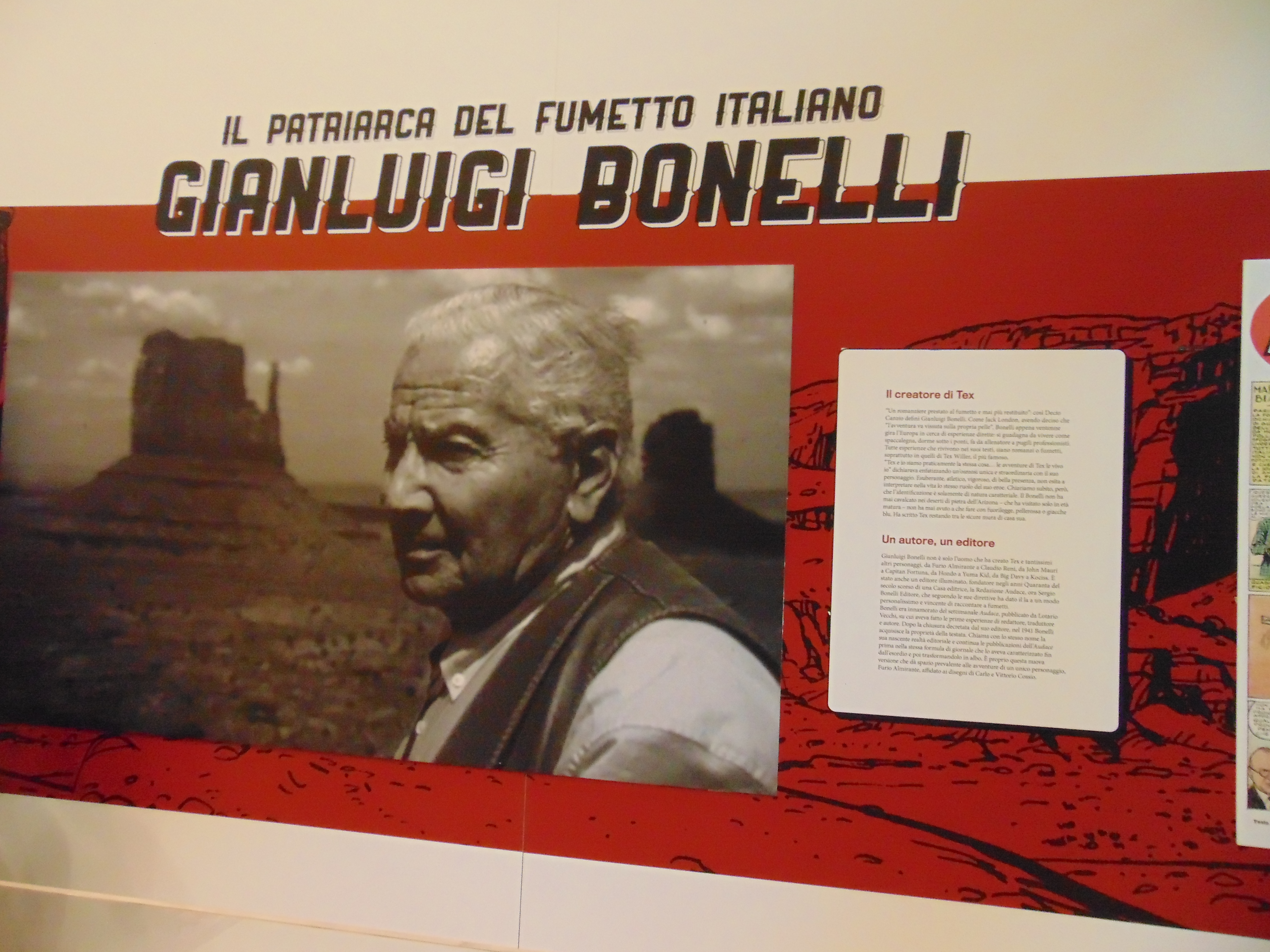 Tex - 70 anni di un mito @ Arf! Festival 2019